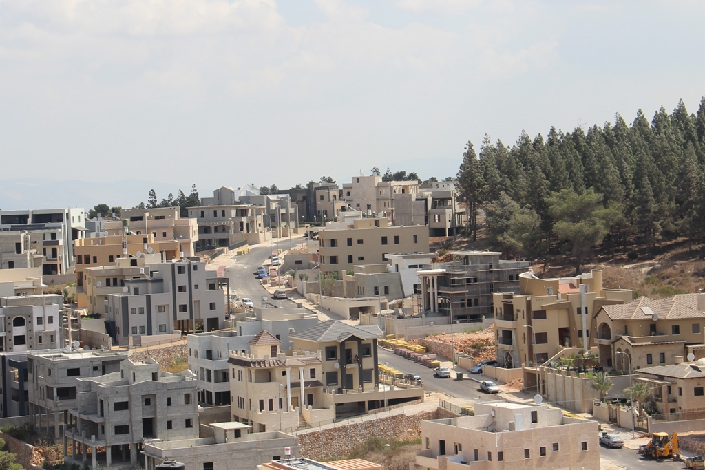 شارع السلام، الشيكونات - أم الفحم